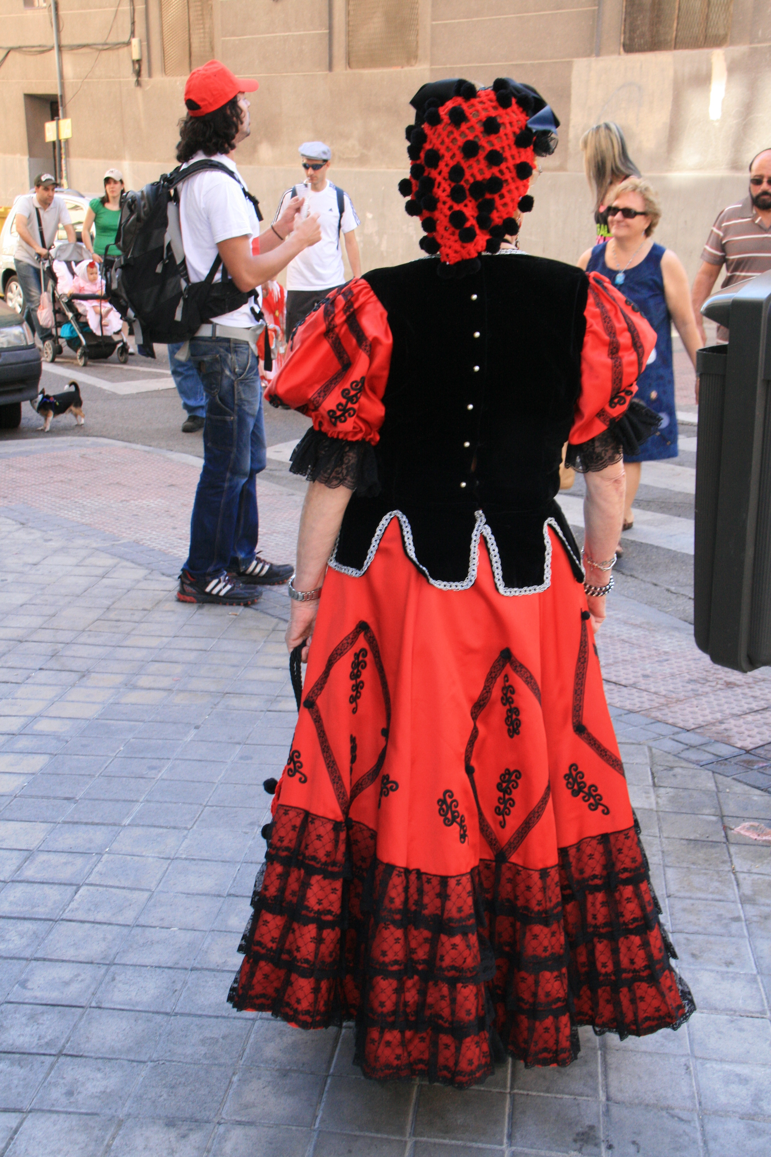 Goyesca